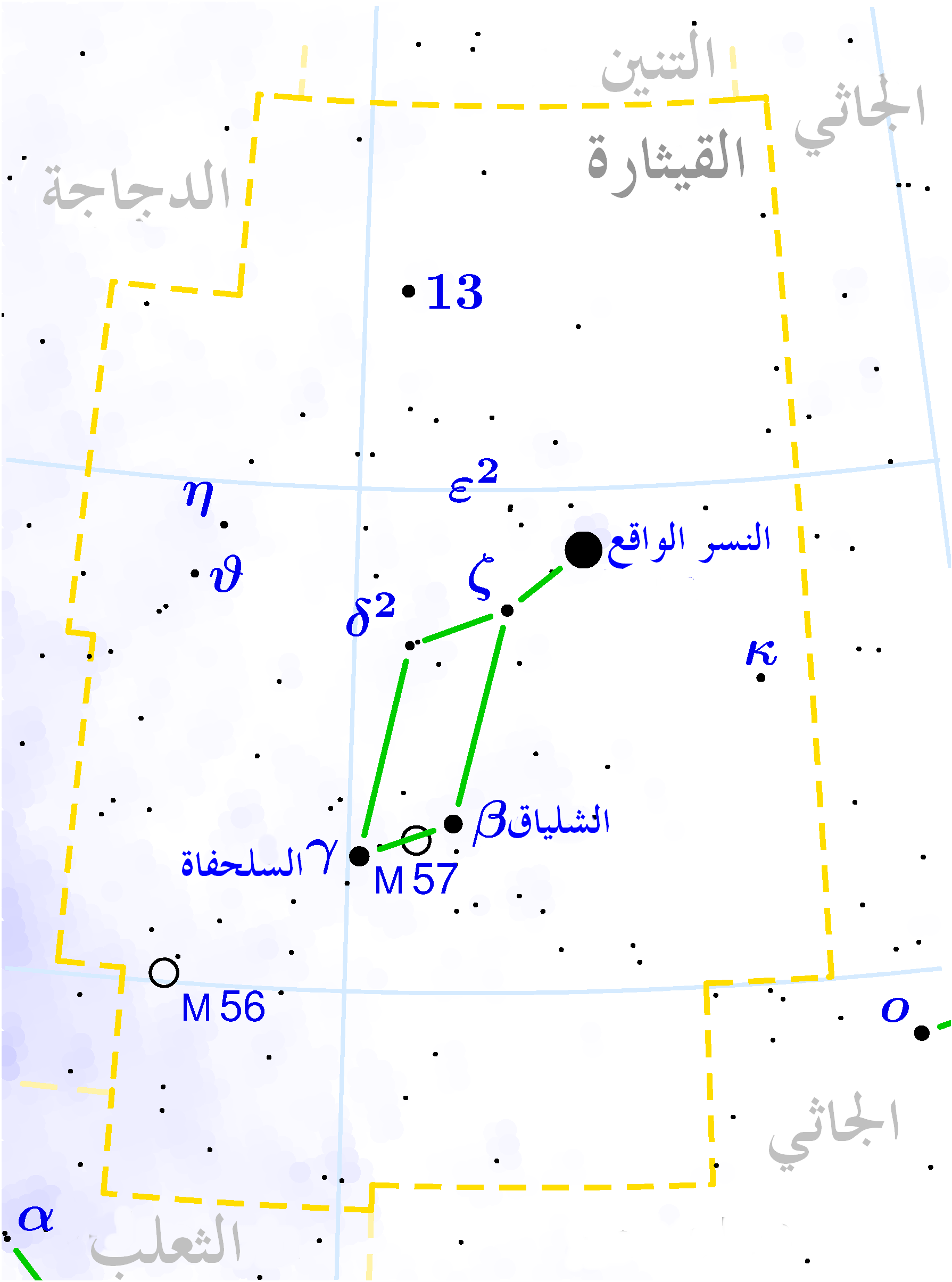 Lyra constellation map in Arabic